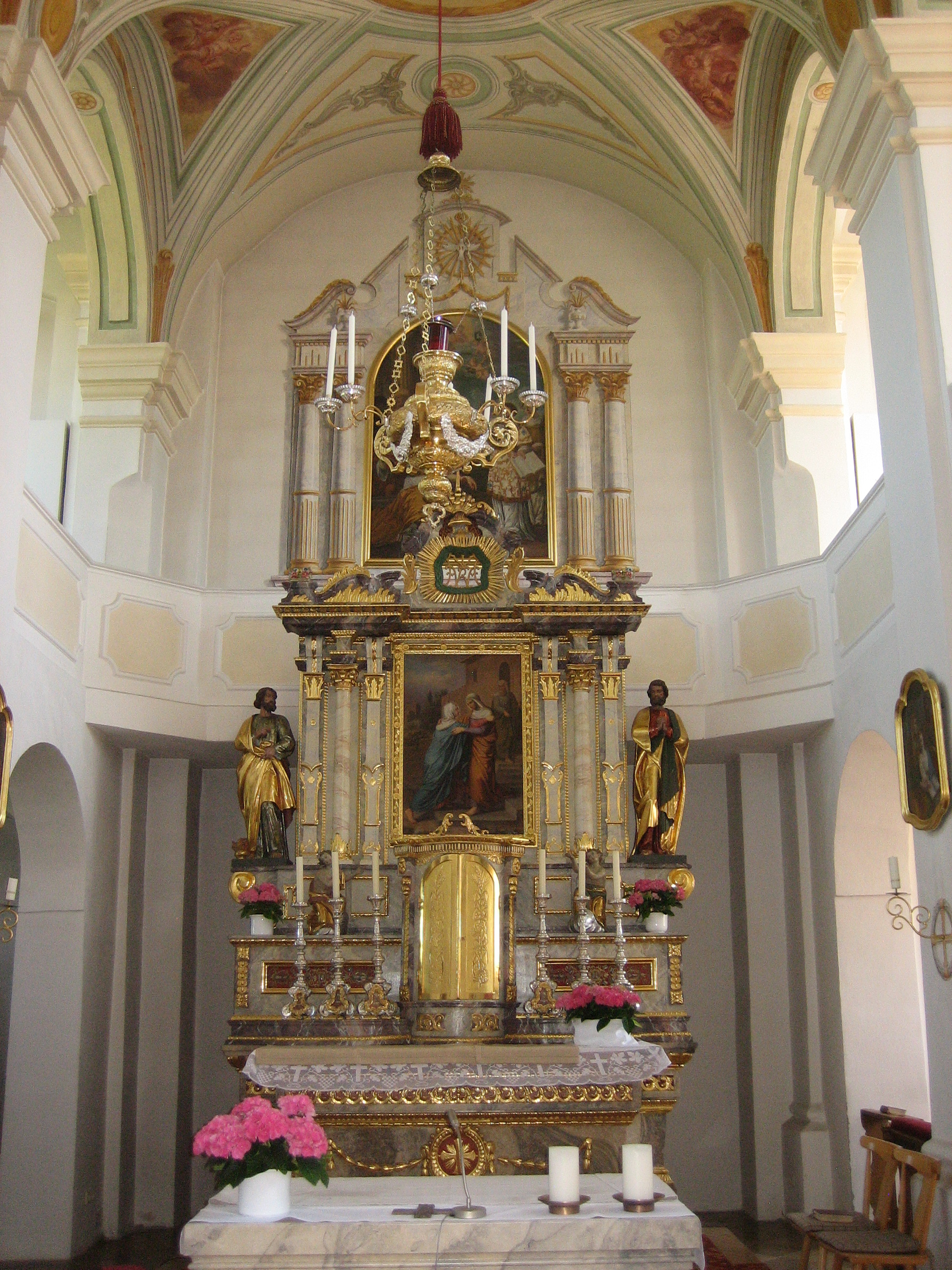 Pfarrkirche Niederdorf